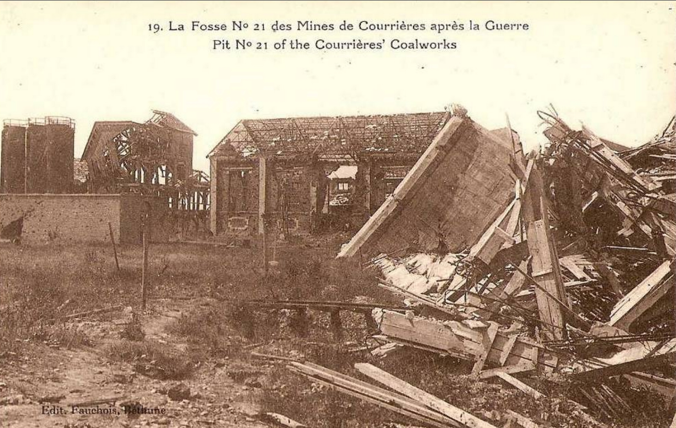 La fosse n° 21 - 22 dite Hector Coppin de la Compagnie des mines de Courrières était un charbonnage constitué de deux puits situé à Harnes, Pas-de-Calais, Nord-Pas-de-Calais, France.